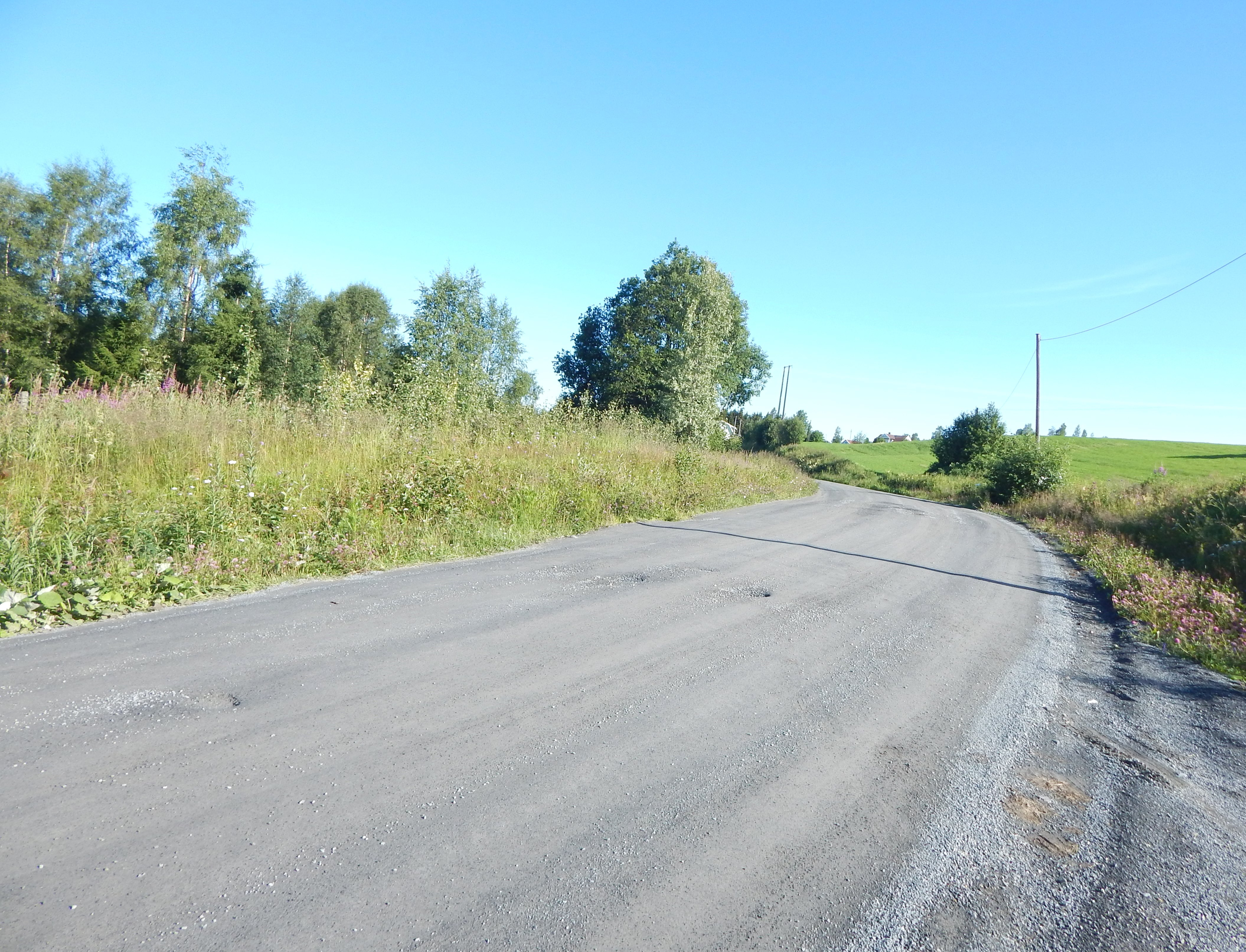 Østre del av Holtevegen er fylkesvei 1662 (tidl. 5).